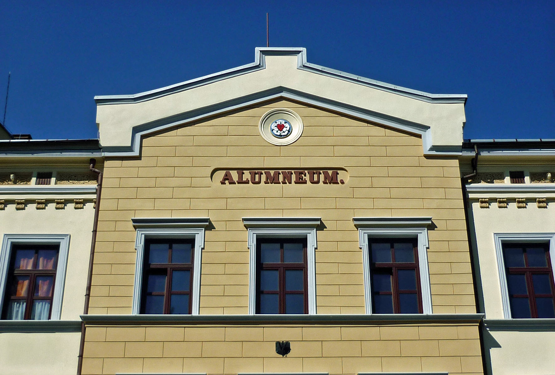 Zabytkowy budynek eklektyczny wybudowany w 1865 roku jako bursa dla młodzieży ewangelickiej. W obiekcie zlokalizowana jest siedziba Parafii Ewangelicko-Augsburskiej w Cieszynie.